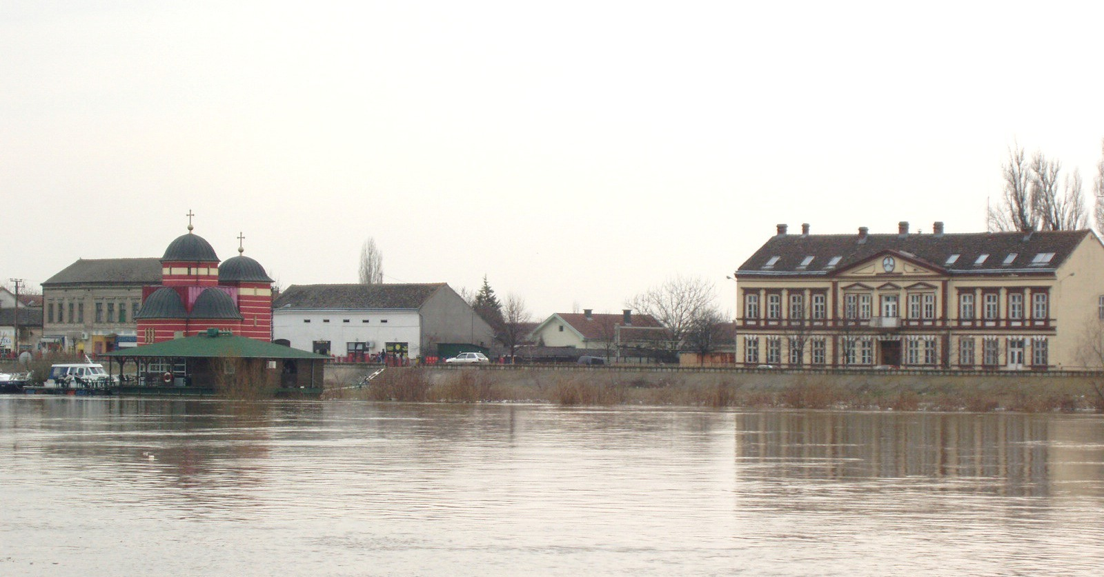 Mačvanska Mitrovica, Serbia, Vojvodina/Mačvanska Mitrovica, Serbie, Voïvodine